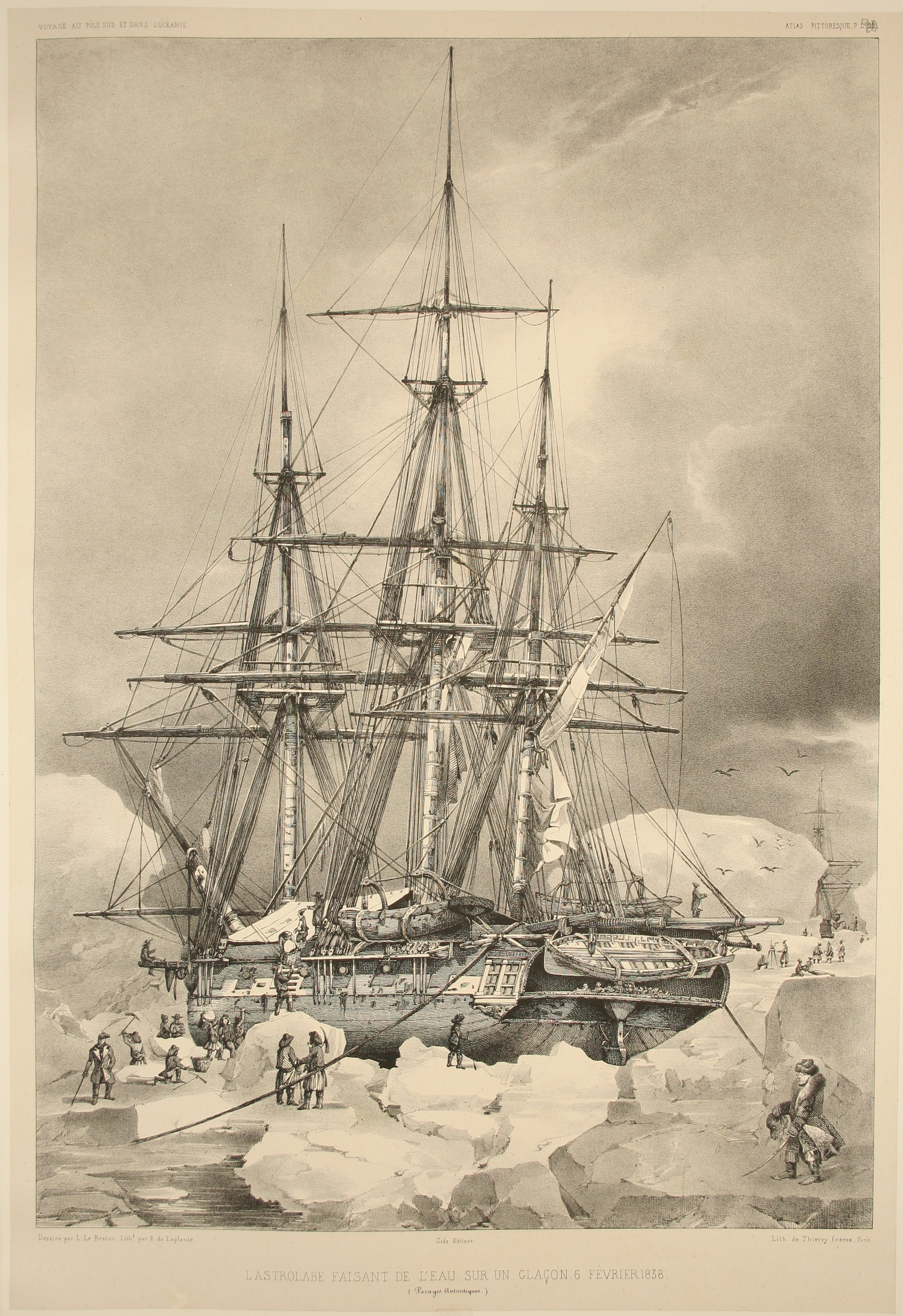 L'astrolabe faisant de l'eau sur un glaçon le 6 février 1838. Atlas pittoresque, planche 20 (22)